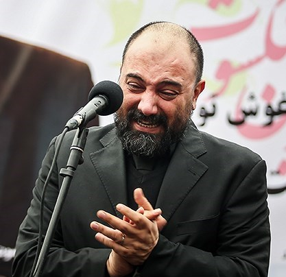 برزو ارجمند در مراسم خاکسپاری پدرش انوشیروان ارجمند